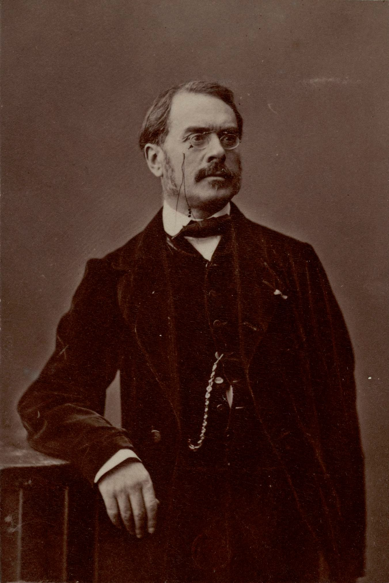 Auguste Vallet de Viriville, photographie, atelier de Félix Nadar, XIXe siècle